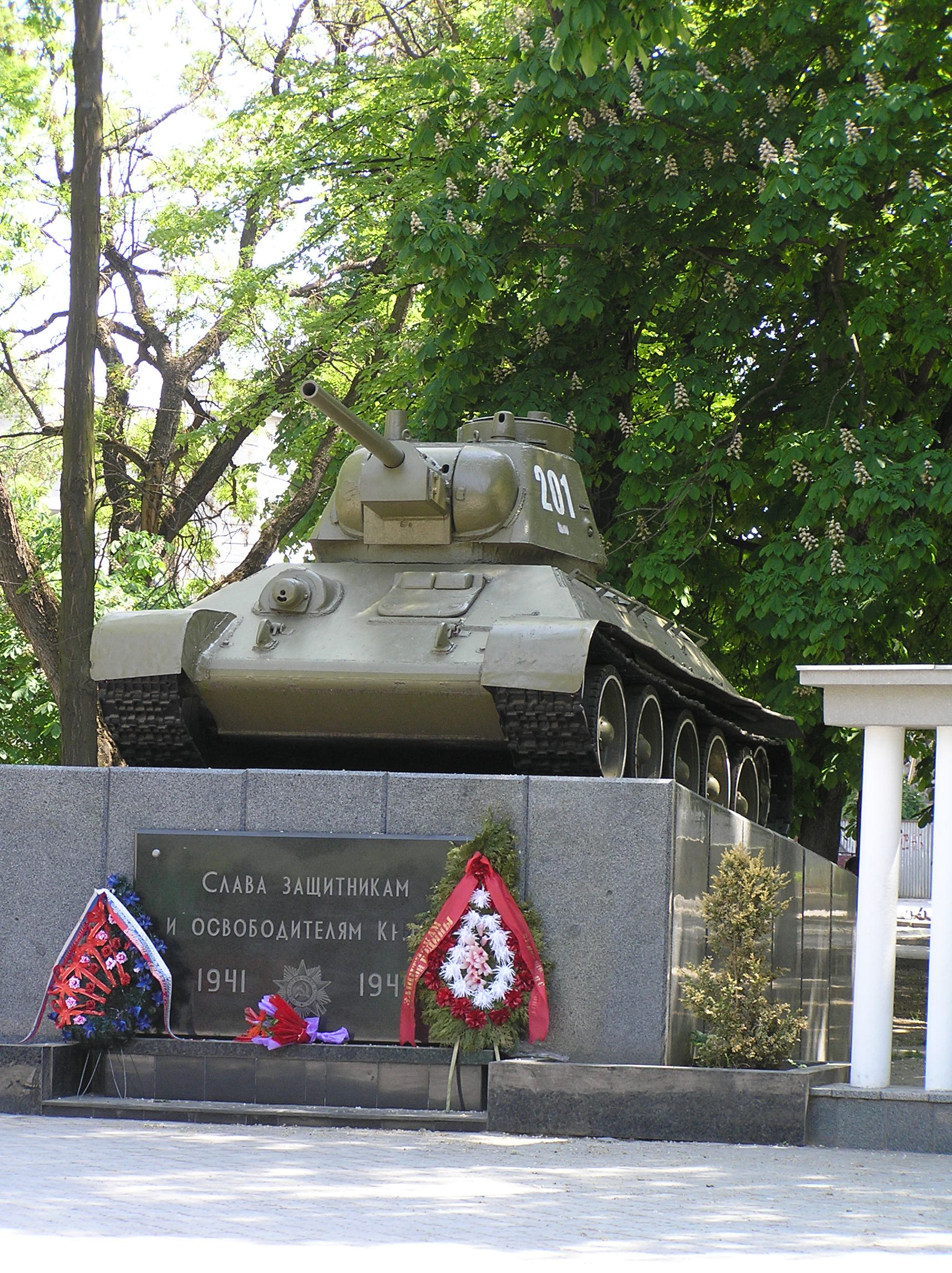 Весной 1944 г. в сквере, в братской могиле были похоронены советские воины, погибшие при освобождении г.Симферополя. В июле того же года было принято решение увековечить подвиг героев-освободителей города от немецко-фашистских захватчиков. В результате на постамент был установлен боевой танк т-34 №201 входивший в состав 19-го Перекопского Краснознаменного танкового корпуса. Установленный танк один из первых ворвался в оккупированный Симферополь.